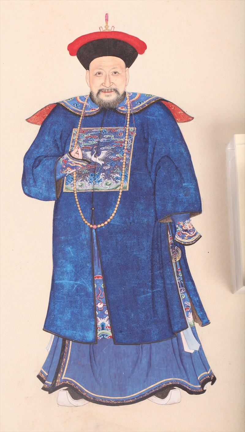 御筆平定臺灣二十功臣像贊》中的董誥畫像，2014年由紐約iGavel拍賣行拍賣。